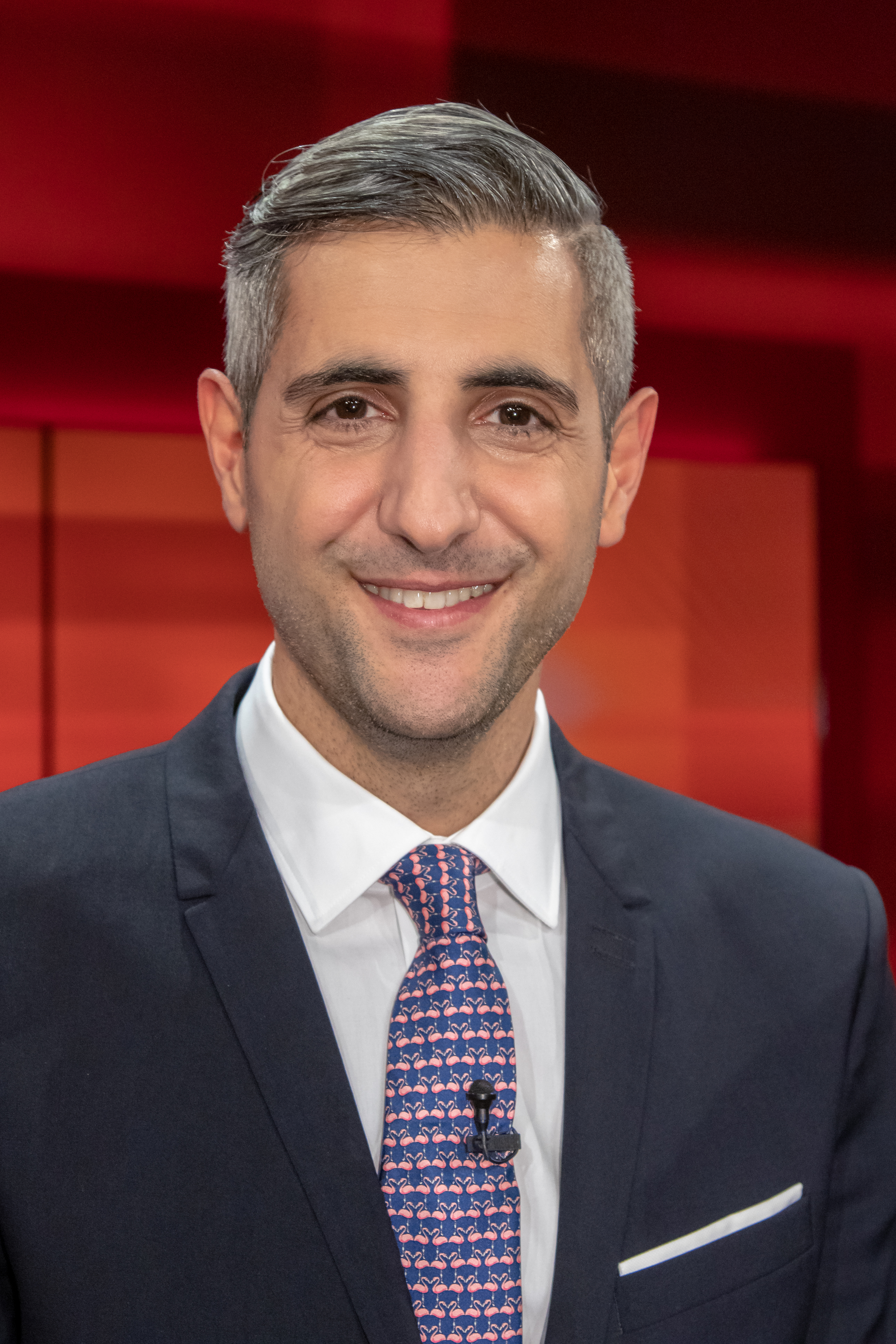 Michel Abdollahi in der WDR-Sendung "hart aber fair" am 17. Dezember 2018